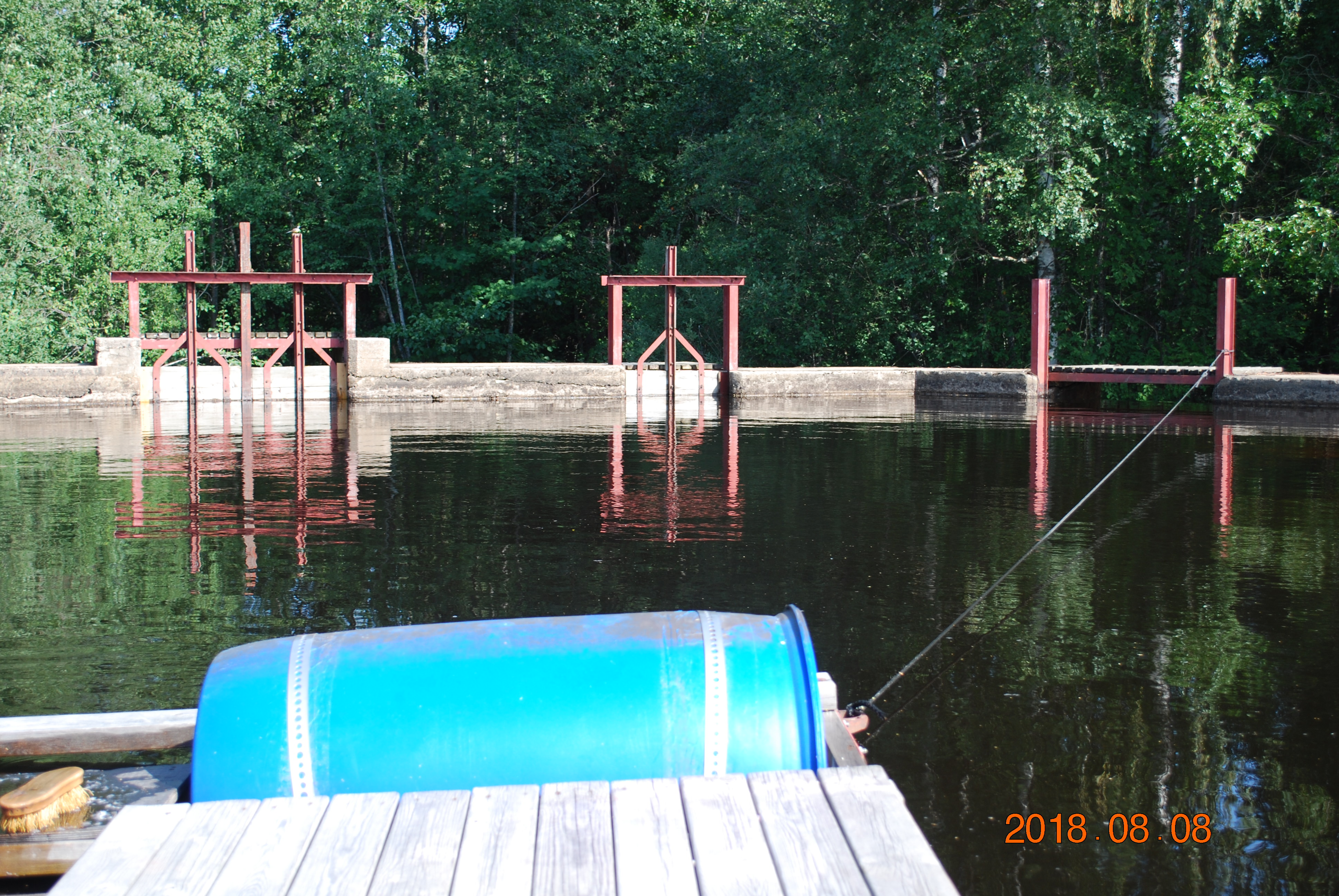 Brygga